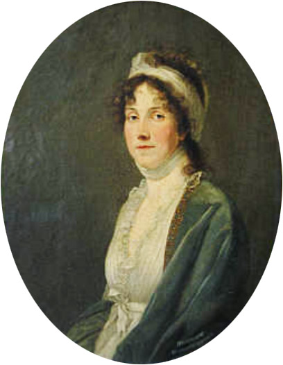 Markgräfin Amalie von Baden (1754-1832)